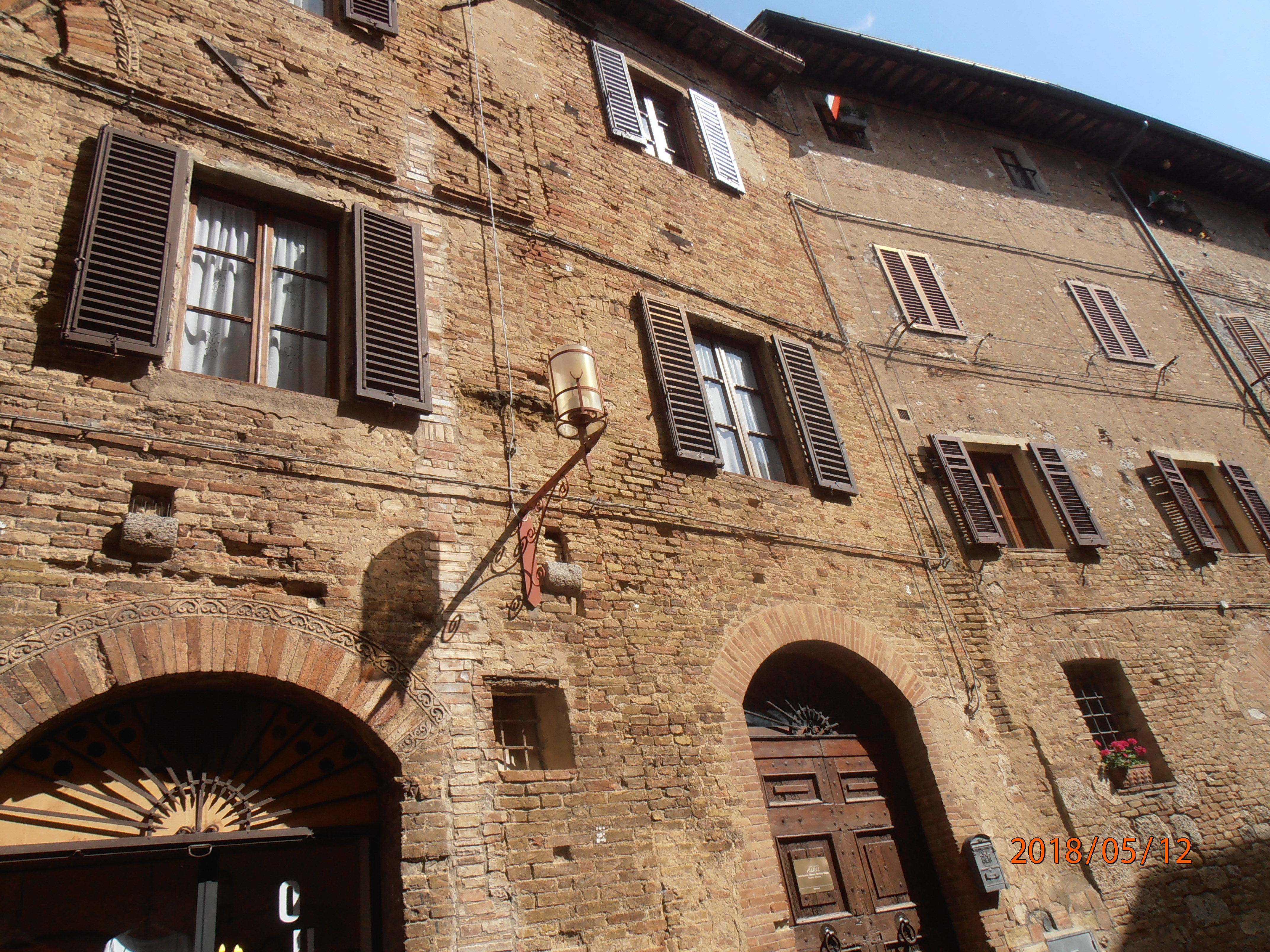 Façana de la casa on va néixer o viure el pintor del Renaixement italià Sebastiano Mainardi a la vila de San Gimignano (La Toscana)